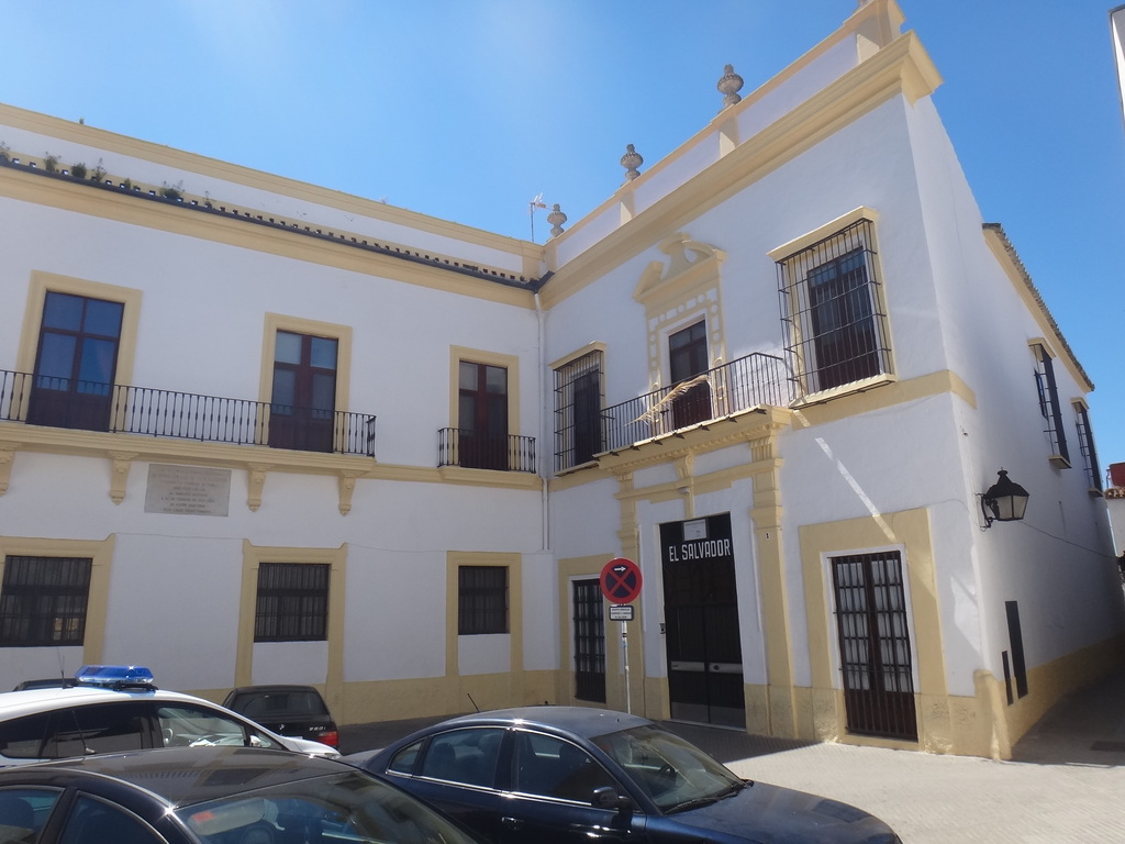 Casa-palacio de los Ponce de León, Jerez de la Frontera (Andalucía, España)